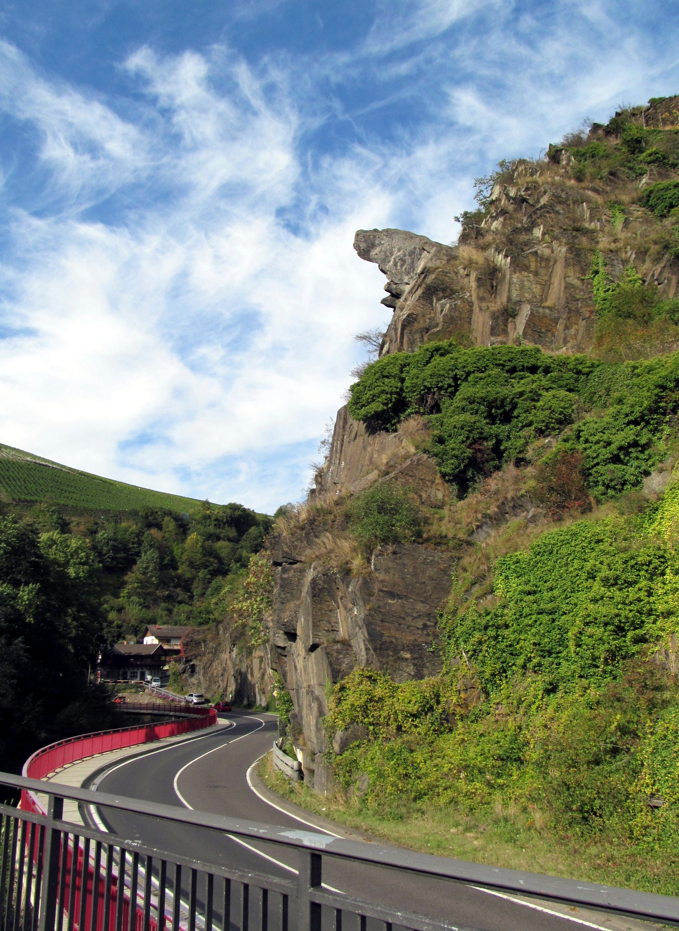 "Bunte Kuh" in Walporzheim bei Ahrweiler, darunter die Straße in Richtung Marienthal und Dernau